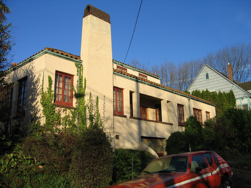 F.H. Dammasch Home - Back view